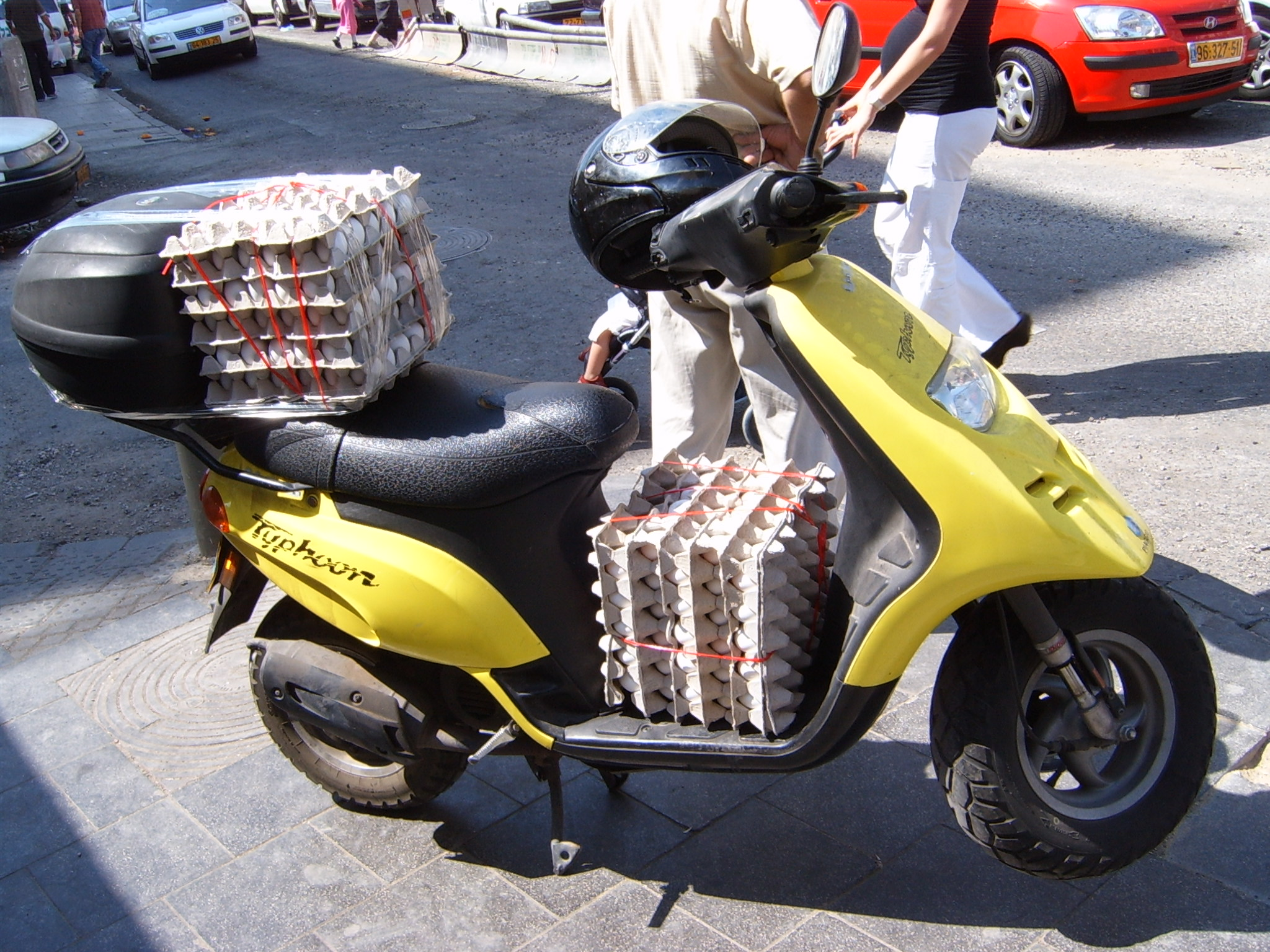 Near Mahane Yehuda Market